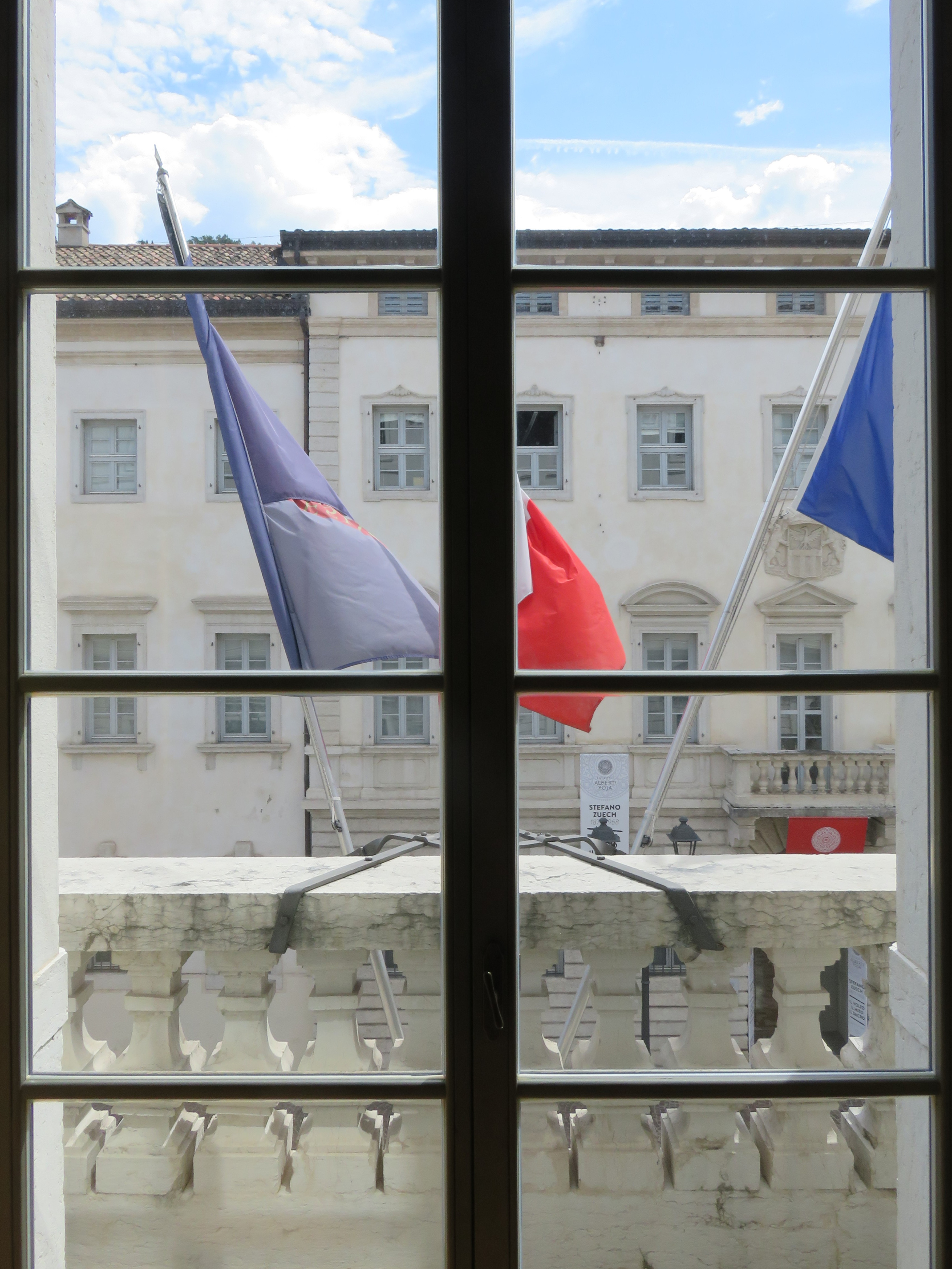 Palazzo Piomarta, finestra aula magna. vista su palazzo Alberti Proja